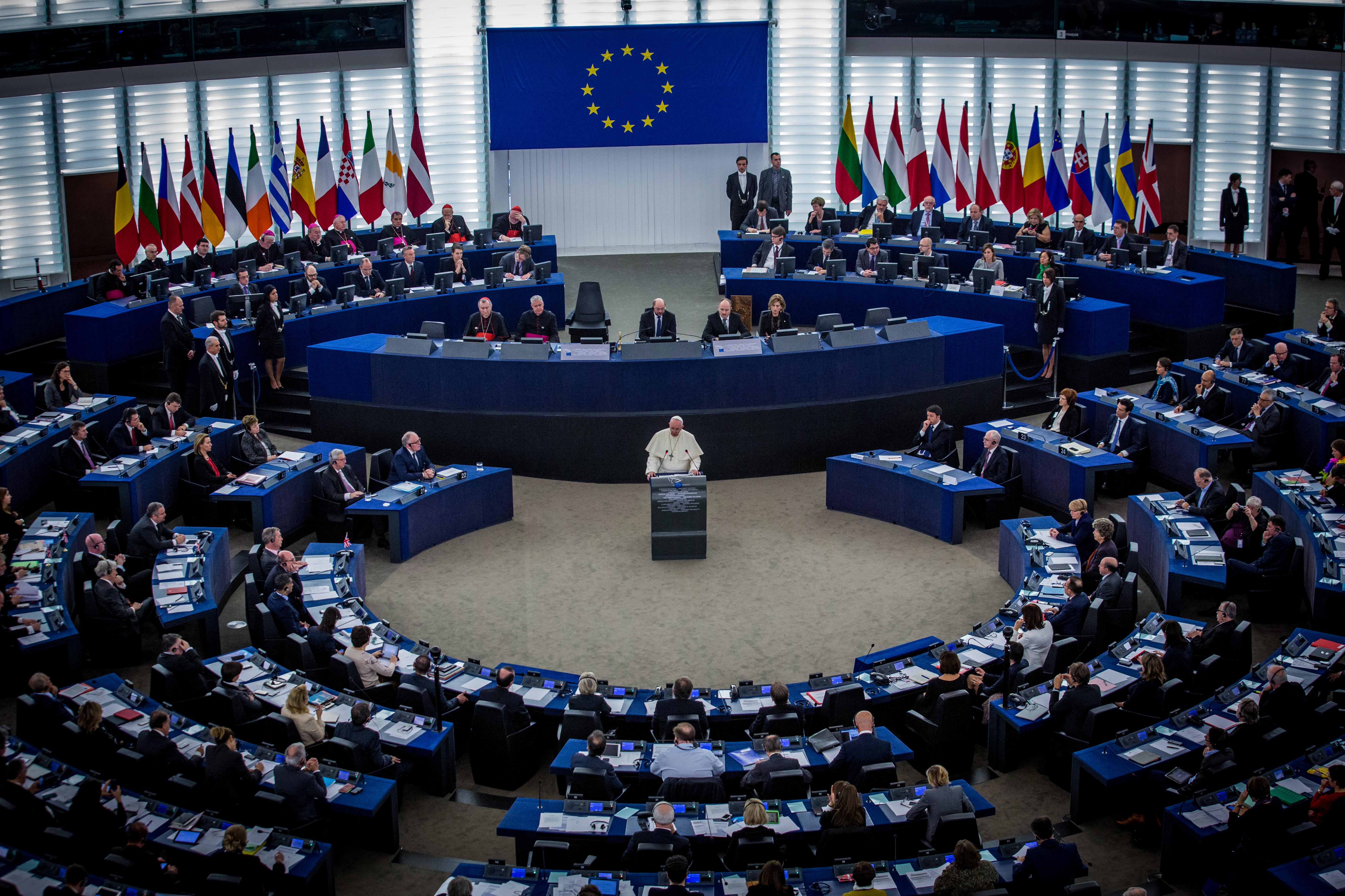 Visite du pape François au Parlement européen de Strasbourg.